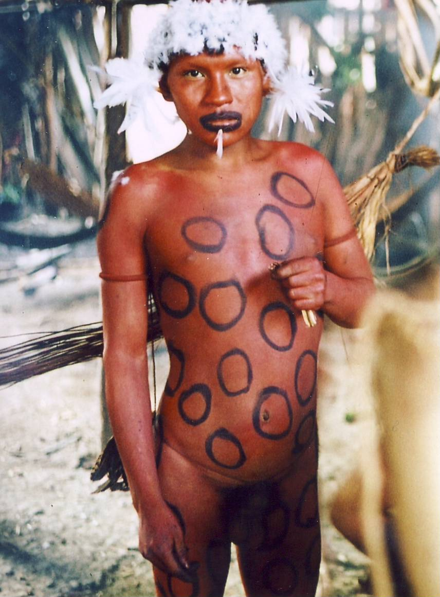 Junger Waika in Festschmuck